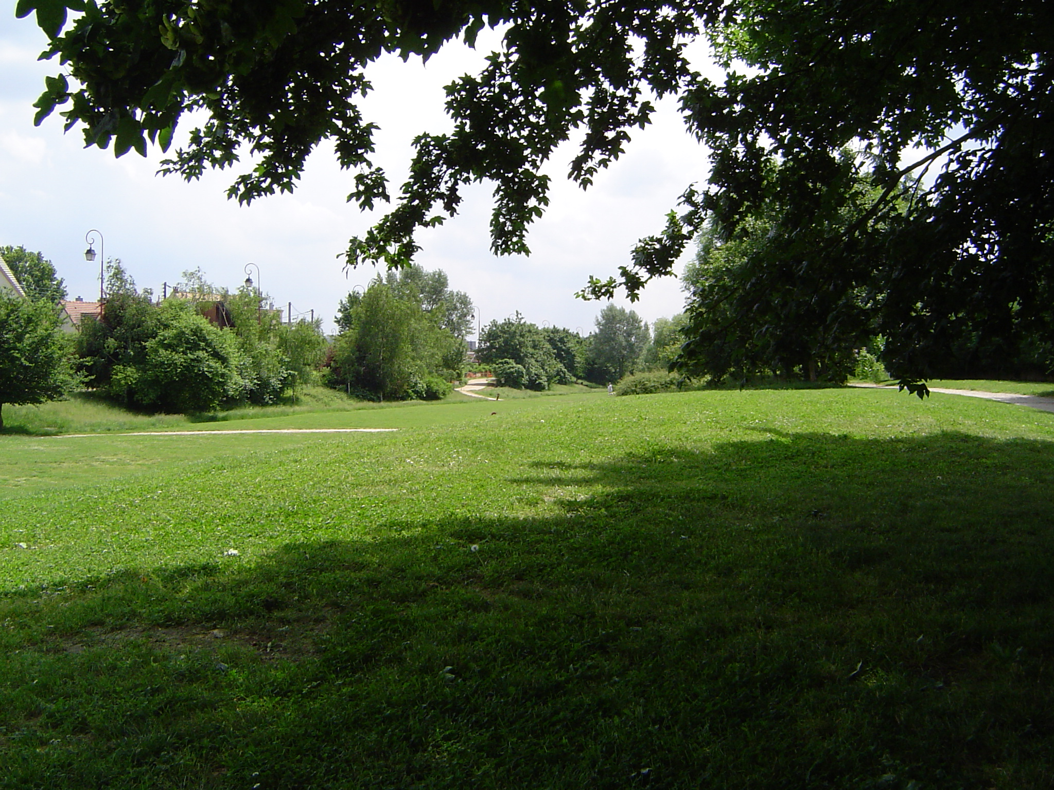 La coulée verte à Antony